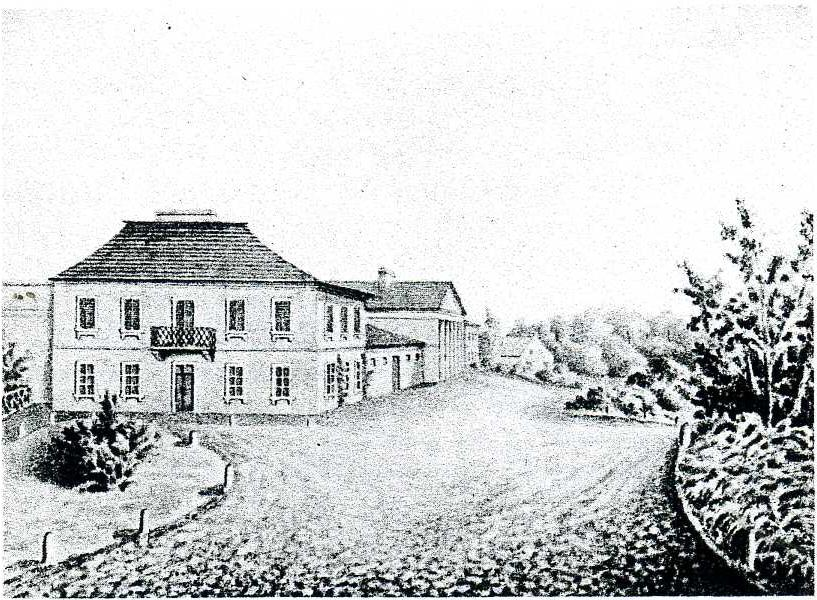 Палац Санґушків в Славуті. «Над стайнями».